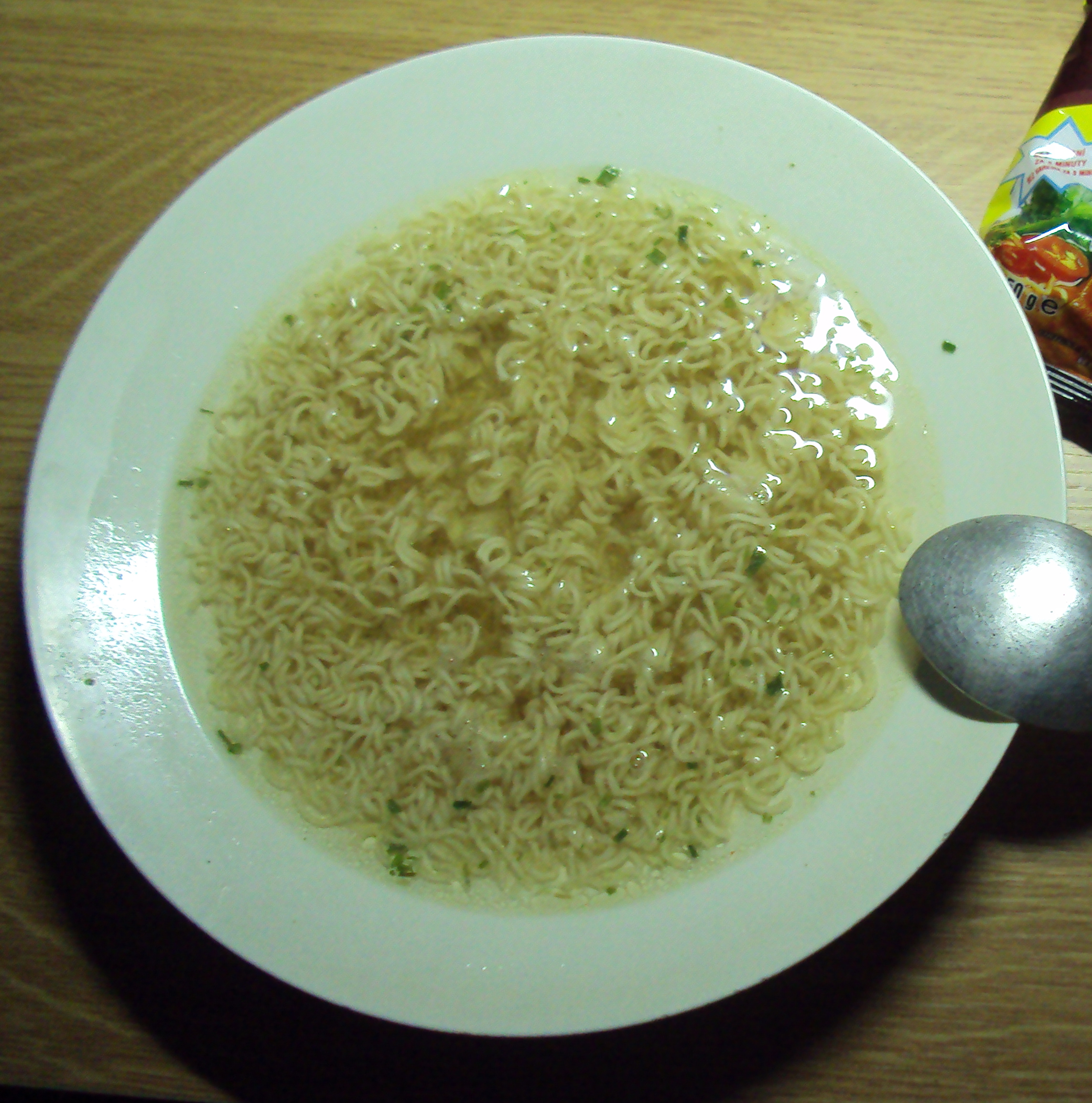 Vietnamská instantní nudlová polévka Bibi, dovozce fa Tiha